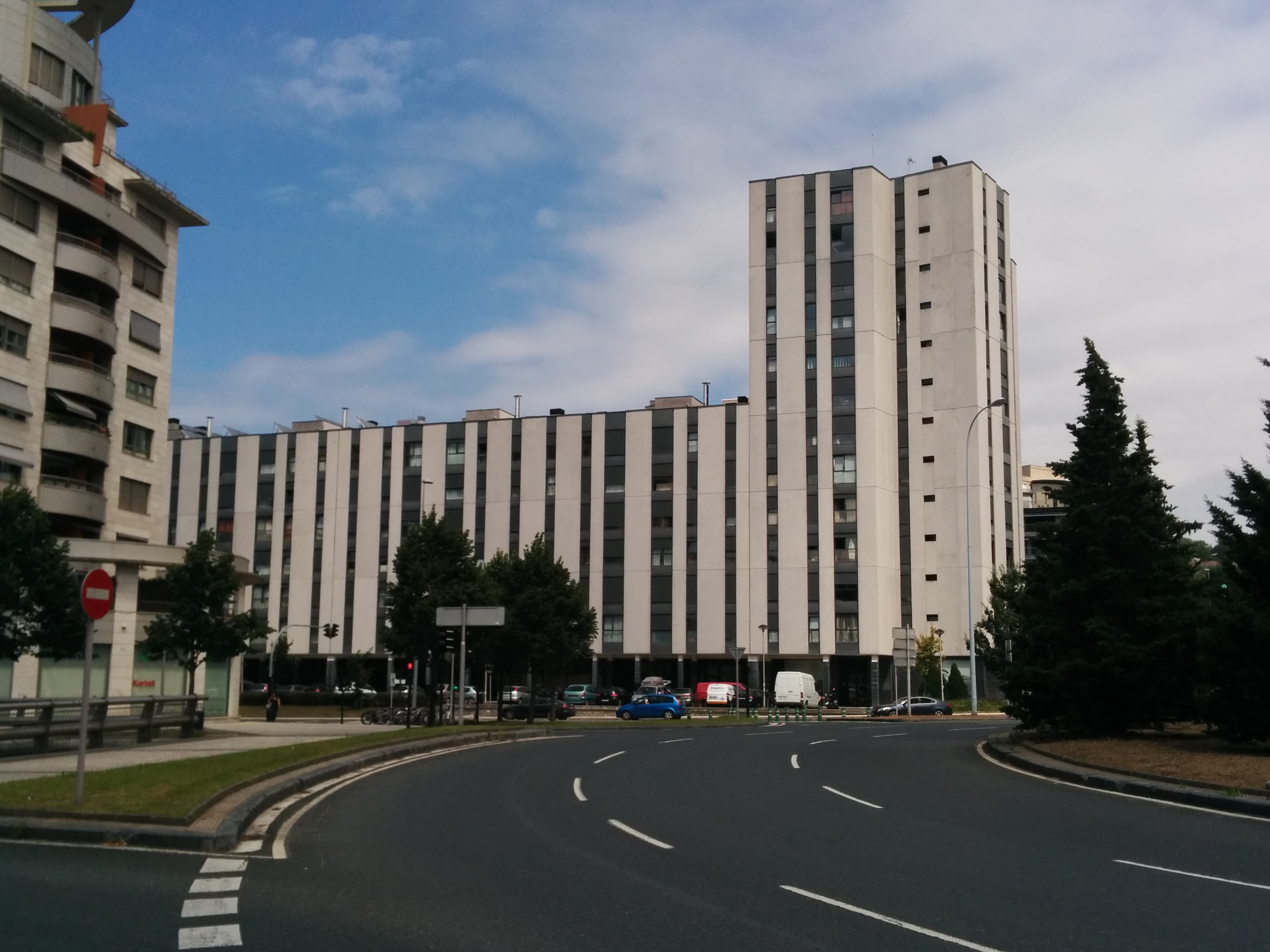 Donostia, Amerika plaza